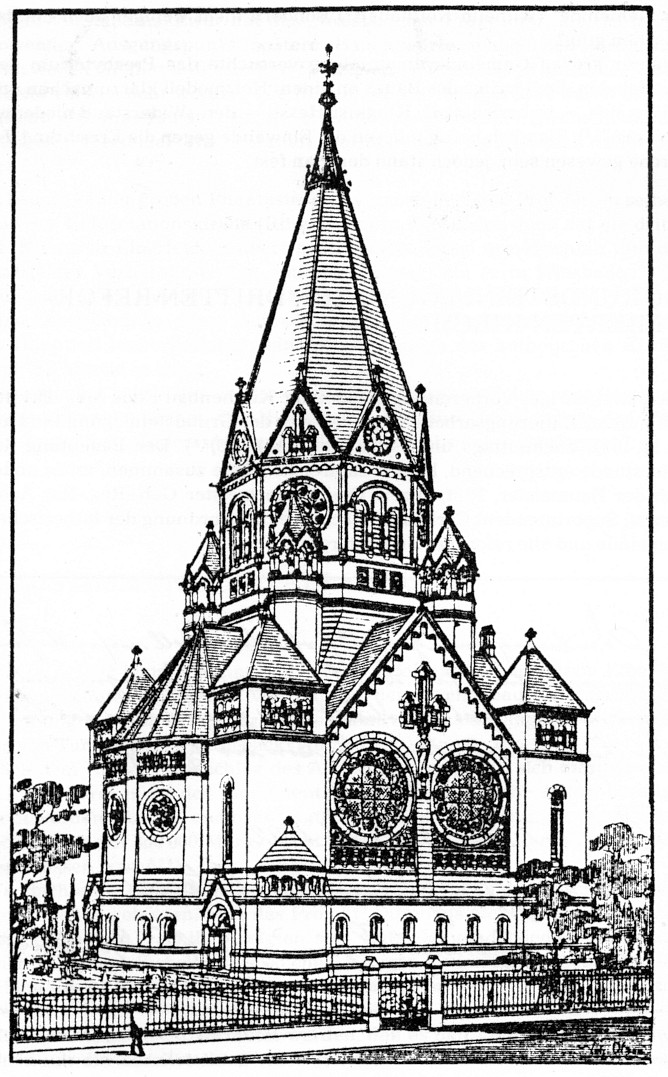 Skizze des Architekten für die Friedhofskirche Wuppertal, 1892